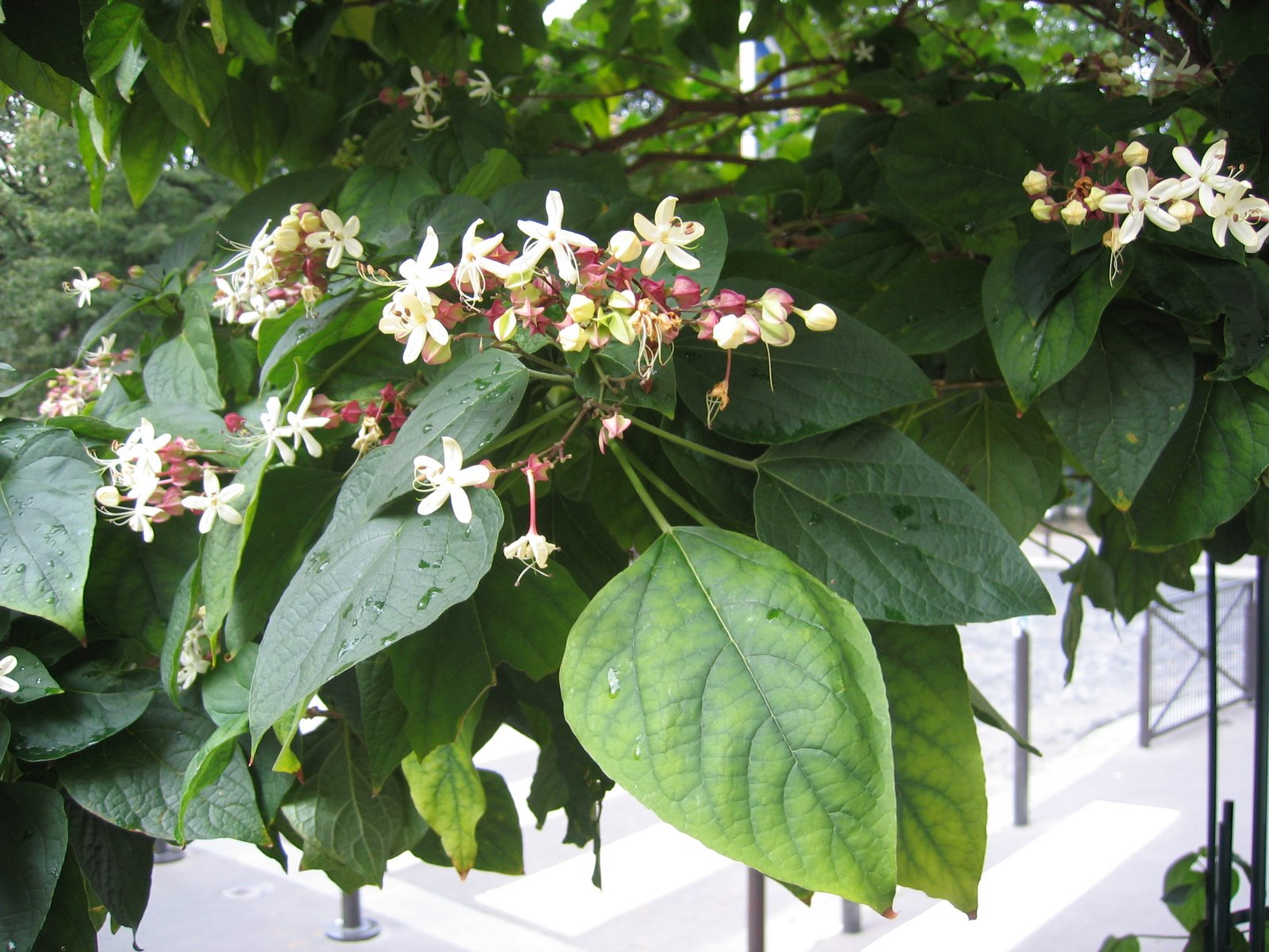 Clerodendrum trichotomum à Paris 15e, à côté de l'église St Léon.